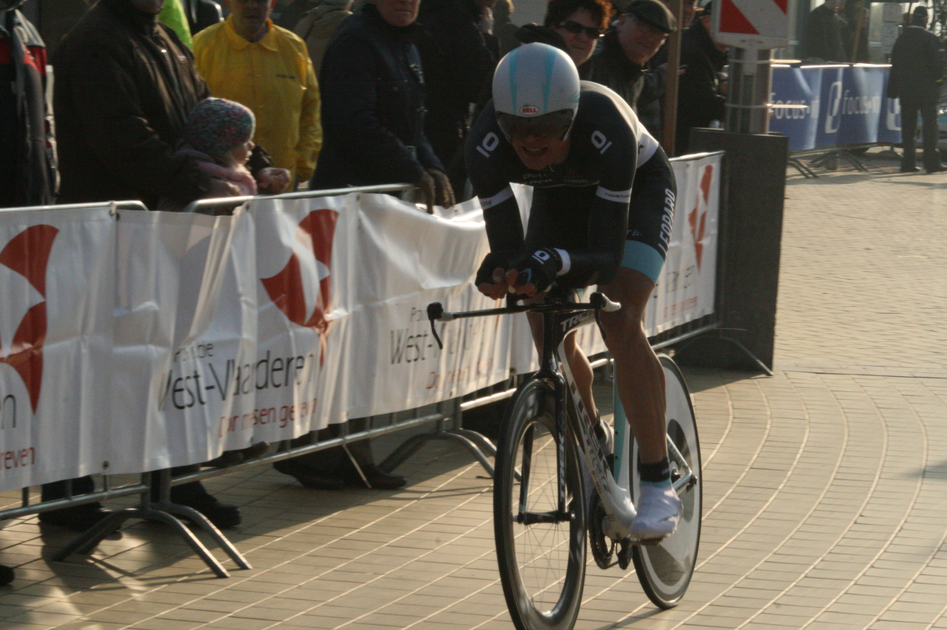 Driedaagse van West-Vlaanderen 2011, proloog in Middelkerke